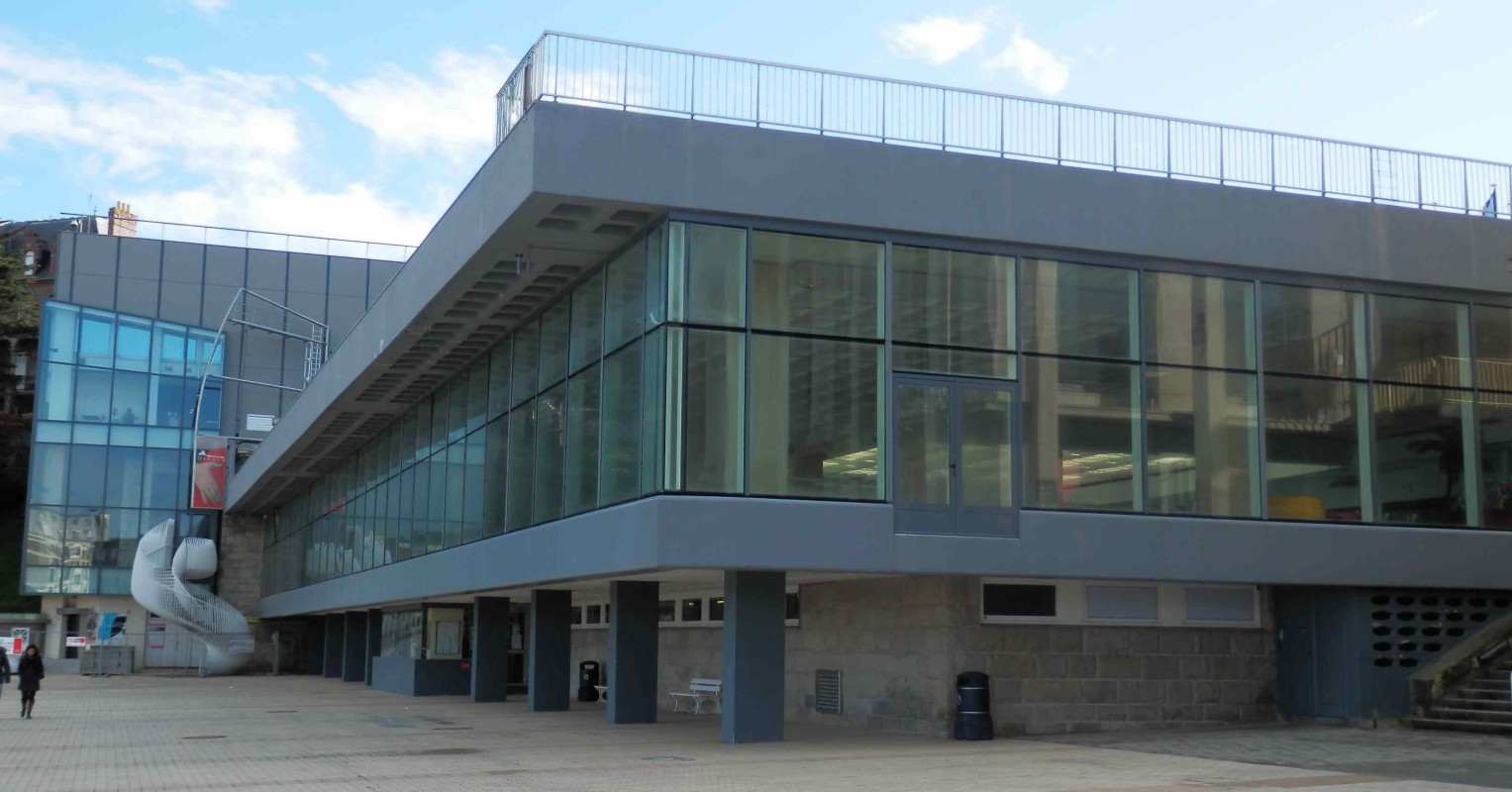 Furlan: La piscine olympique et le Palais des arts et du festival